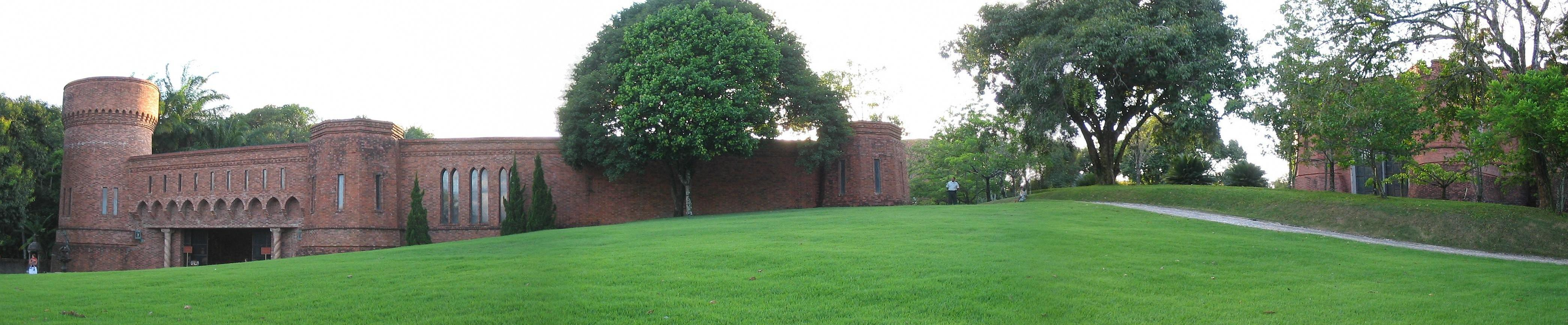 Panorama da fachada do Instituto Ricardo Brennand